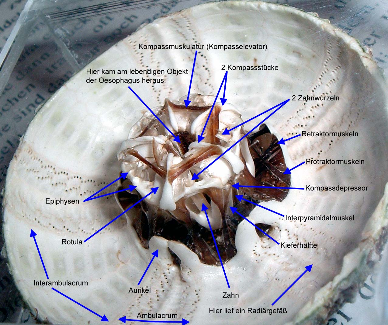 Diese Fotografie ist beschriftet und zeigt die Laterne des Aristoteles eines aufgesägten psammechinus.